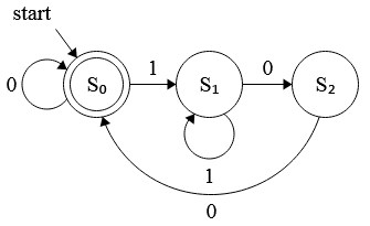 Automat skończony przedstawiający akceptujący liczby binarne podzielne przez 4.